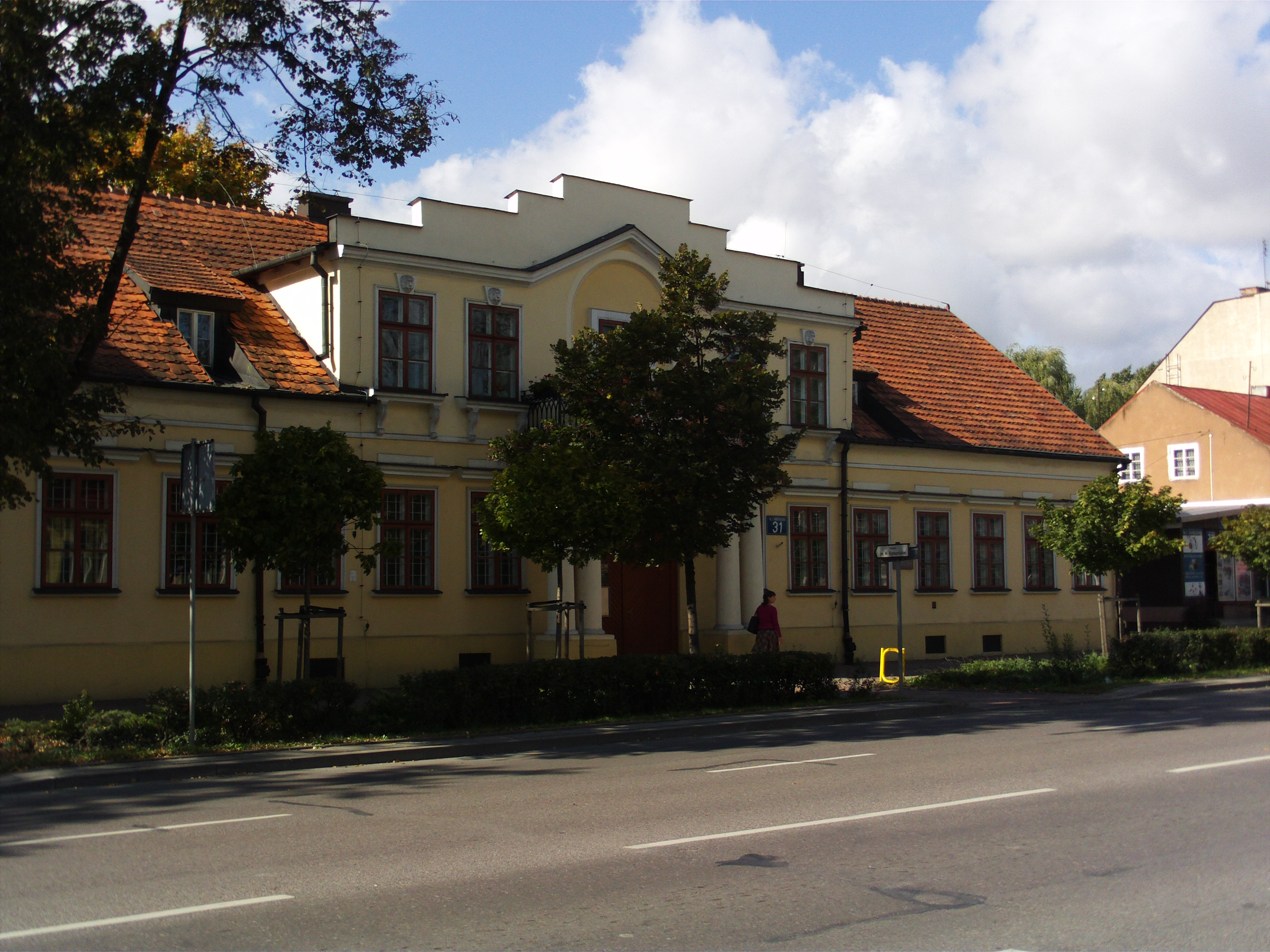 Suwałki ul. Kościuszki 31